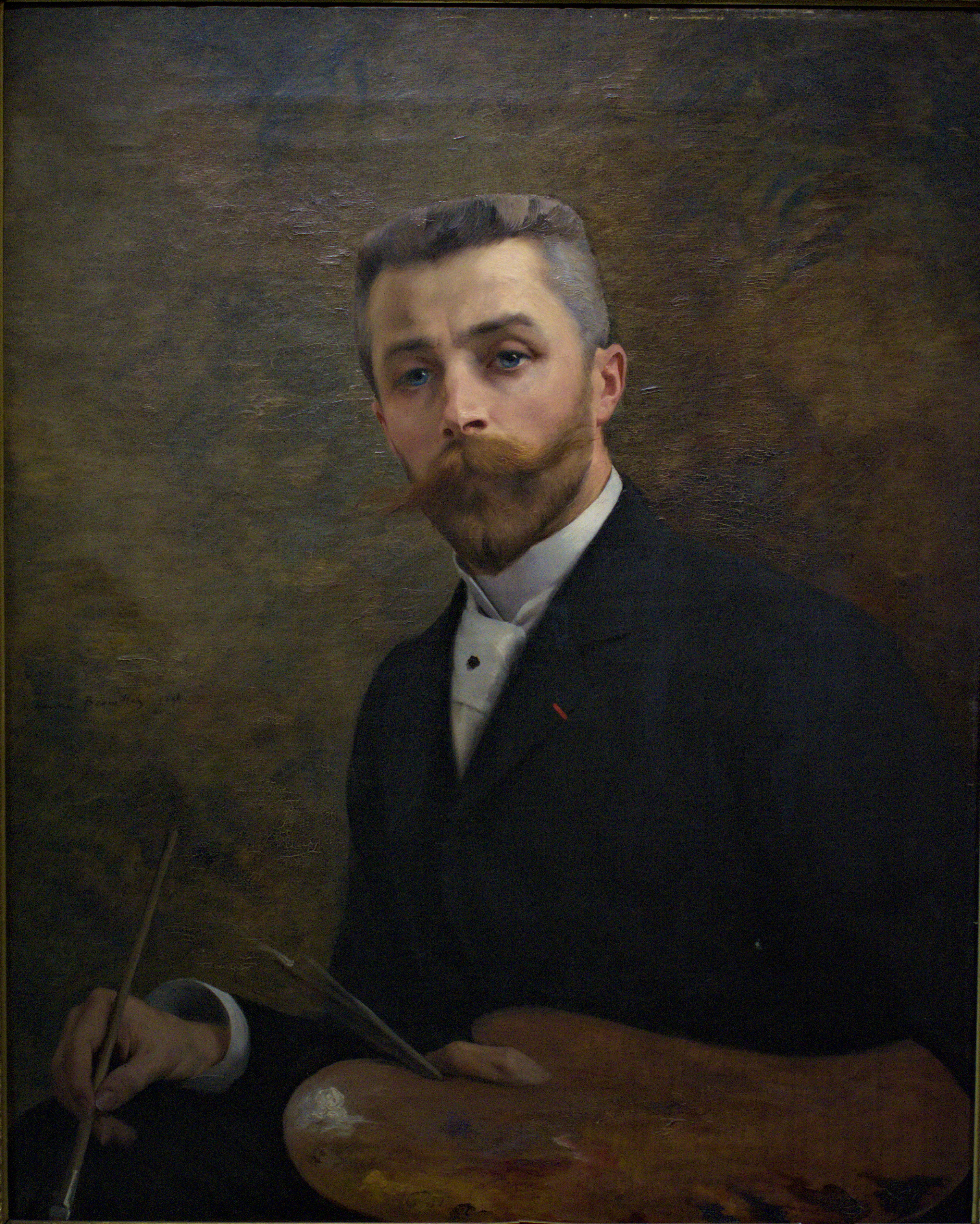 Autoportrait du peintre André Pierre Aristide Brouillet daté de 1898. Exposé au musée Sainte-Croix de Poitiers (France).